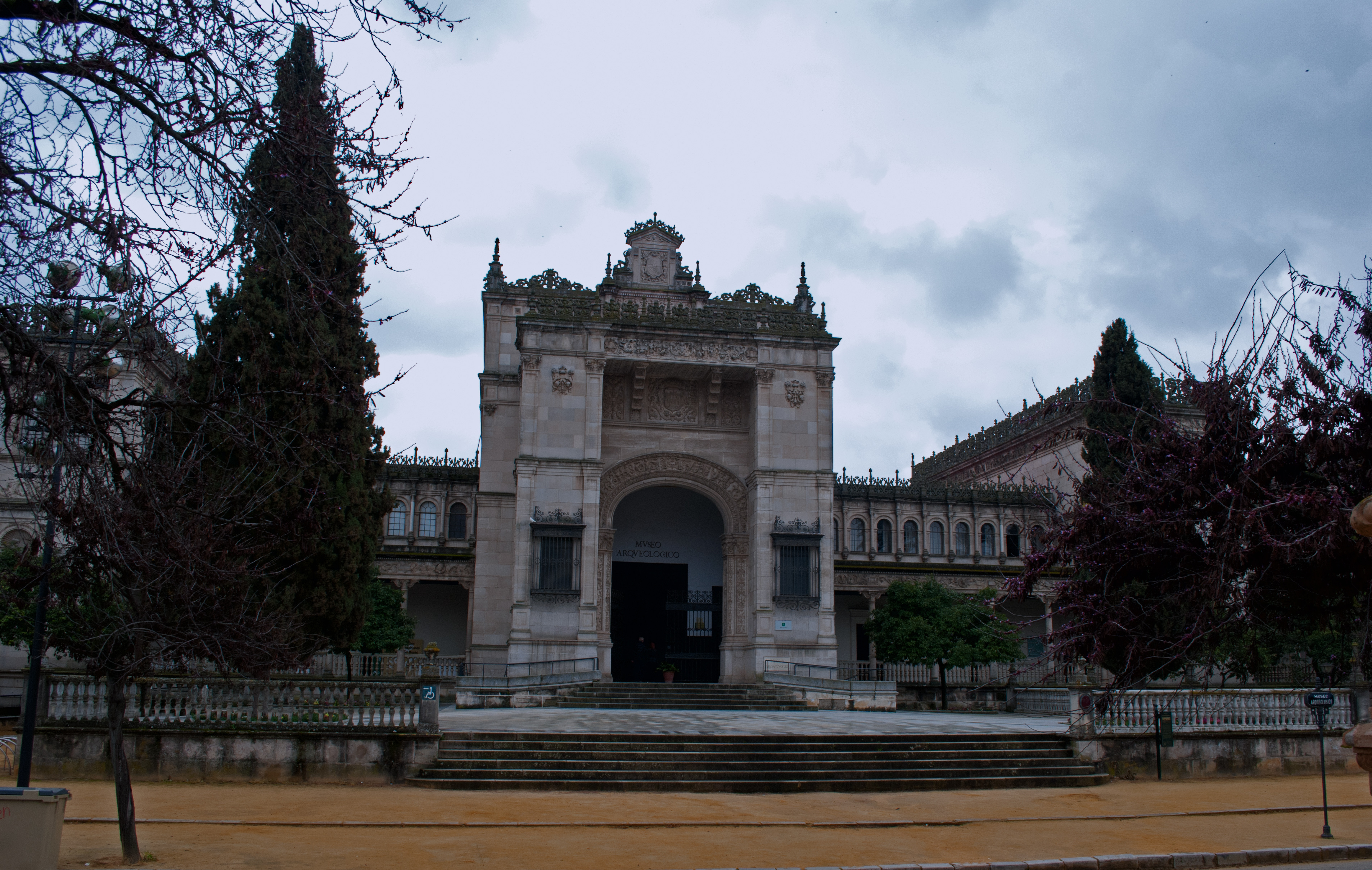 Museo arqueológico de Sevilla, plaza de América, Parque María Luisa. Arquitecto Aníbal González